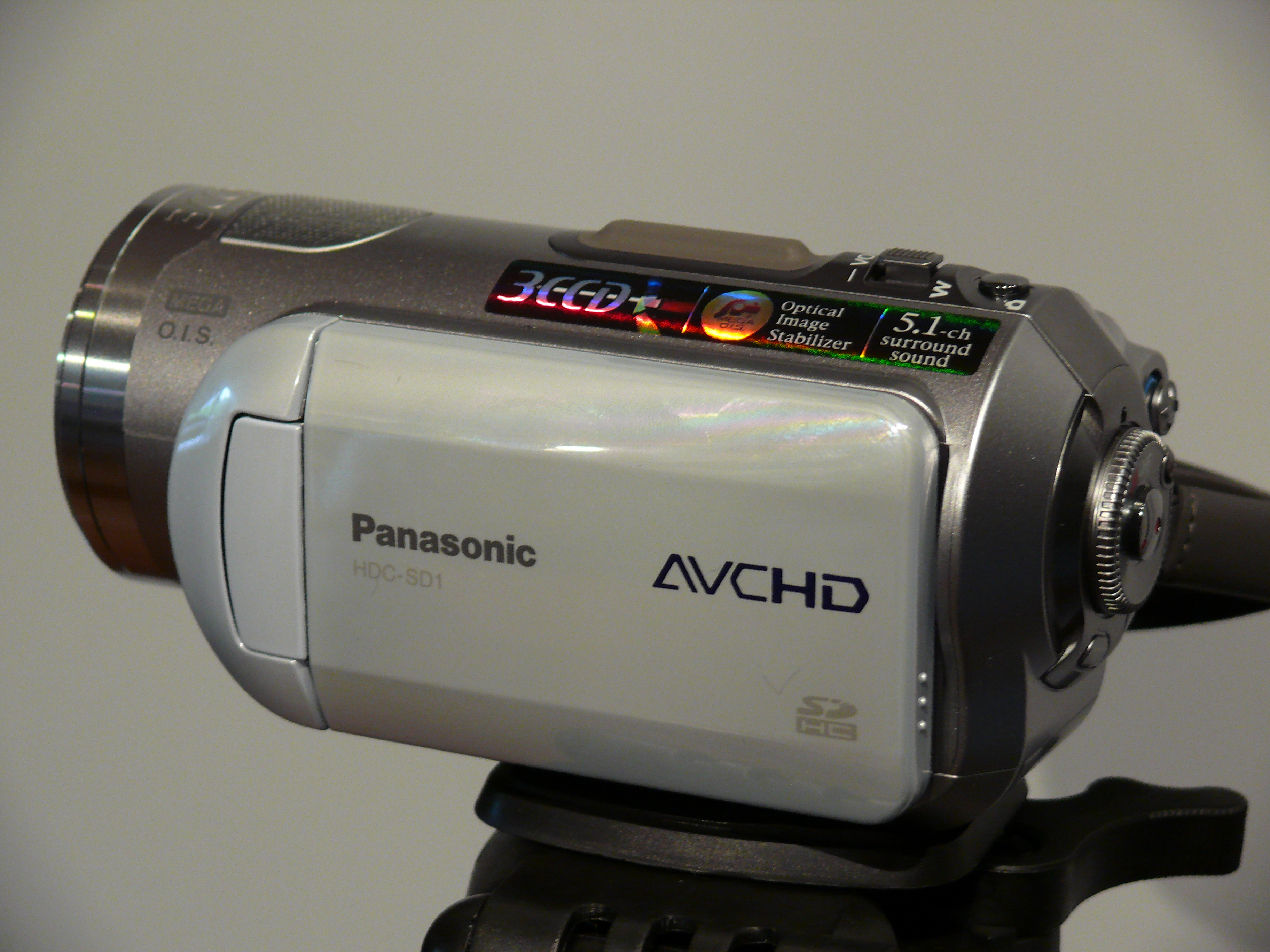 Panasonic AVCHD camera